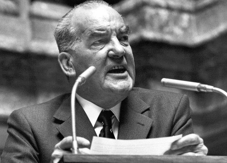 Der Schweizer Bundesrat Rudolf Gnägi während einer Rede im Nationalratssaal